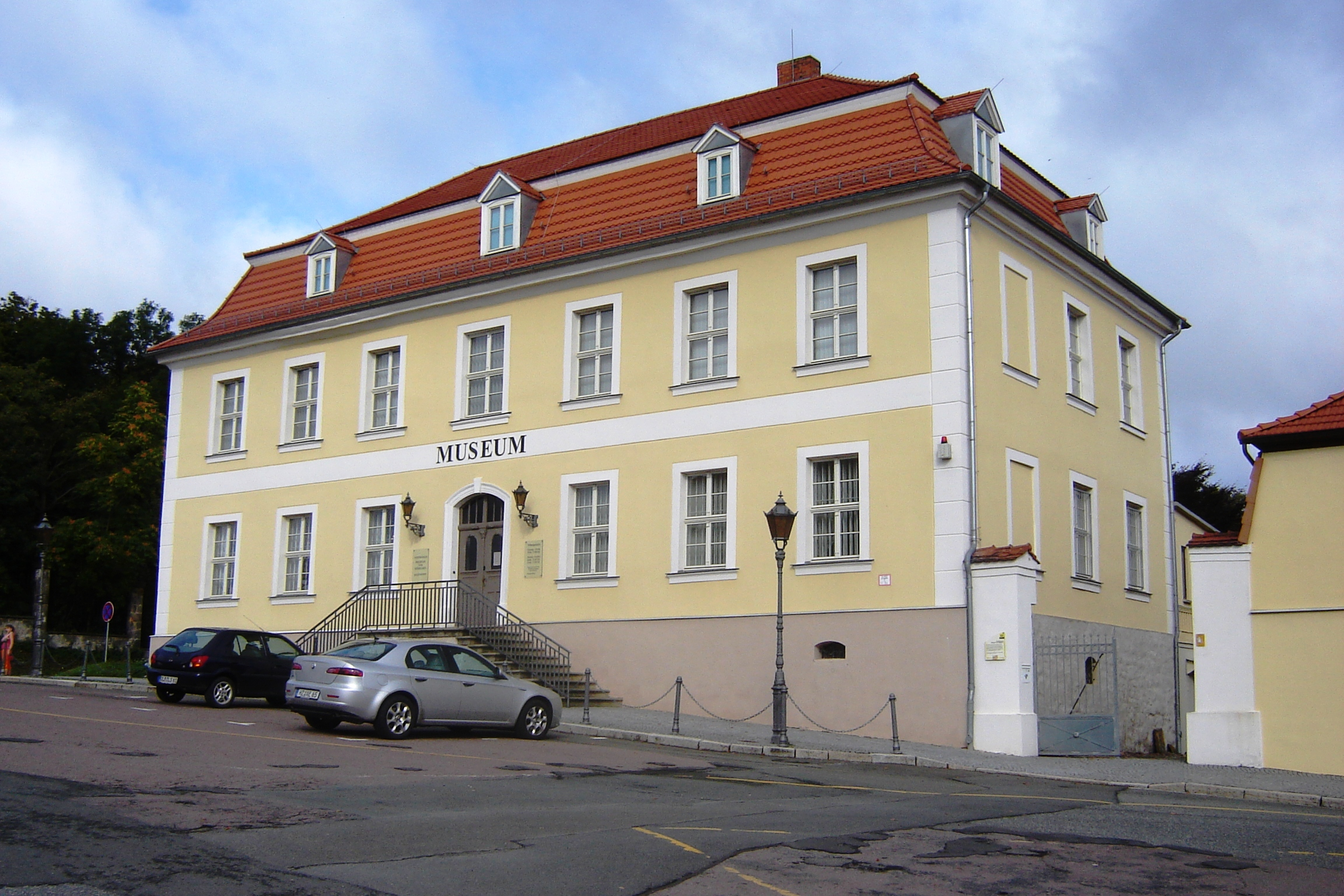 Ballenstedt, Allee 37 (Stadtmuseum Ballenstedt, Kulturdenkmal)